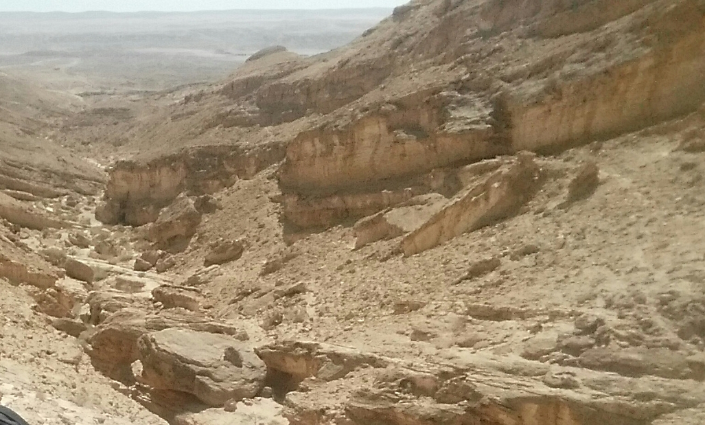 נחל גוב